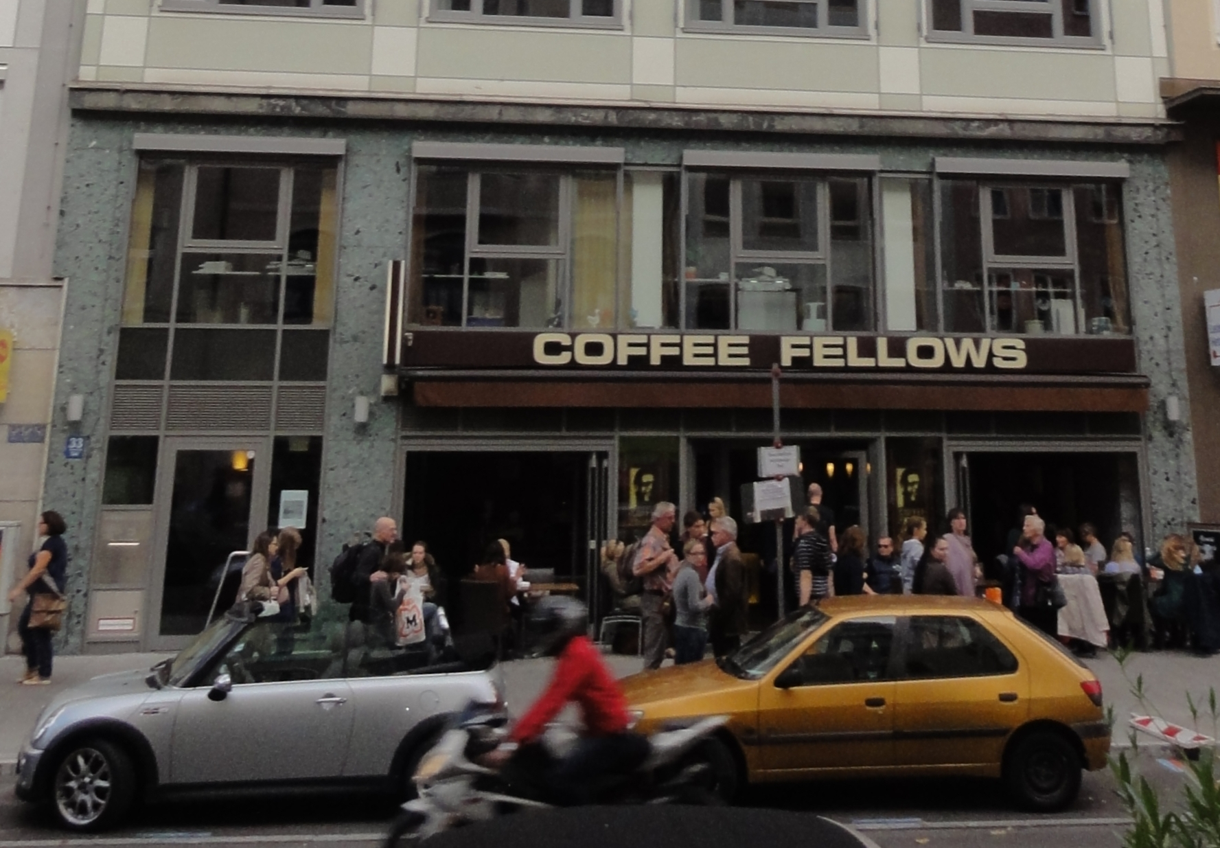 Munich, Tal 33